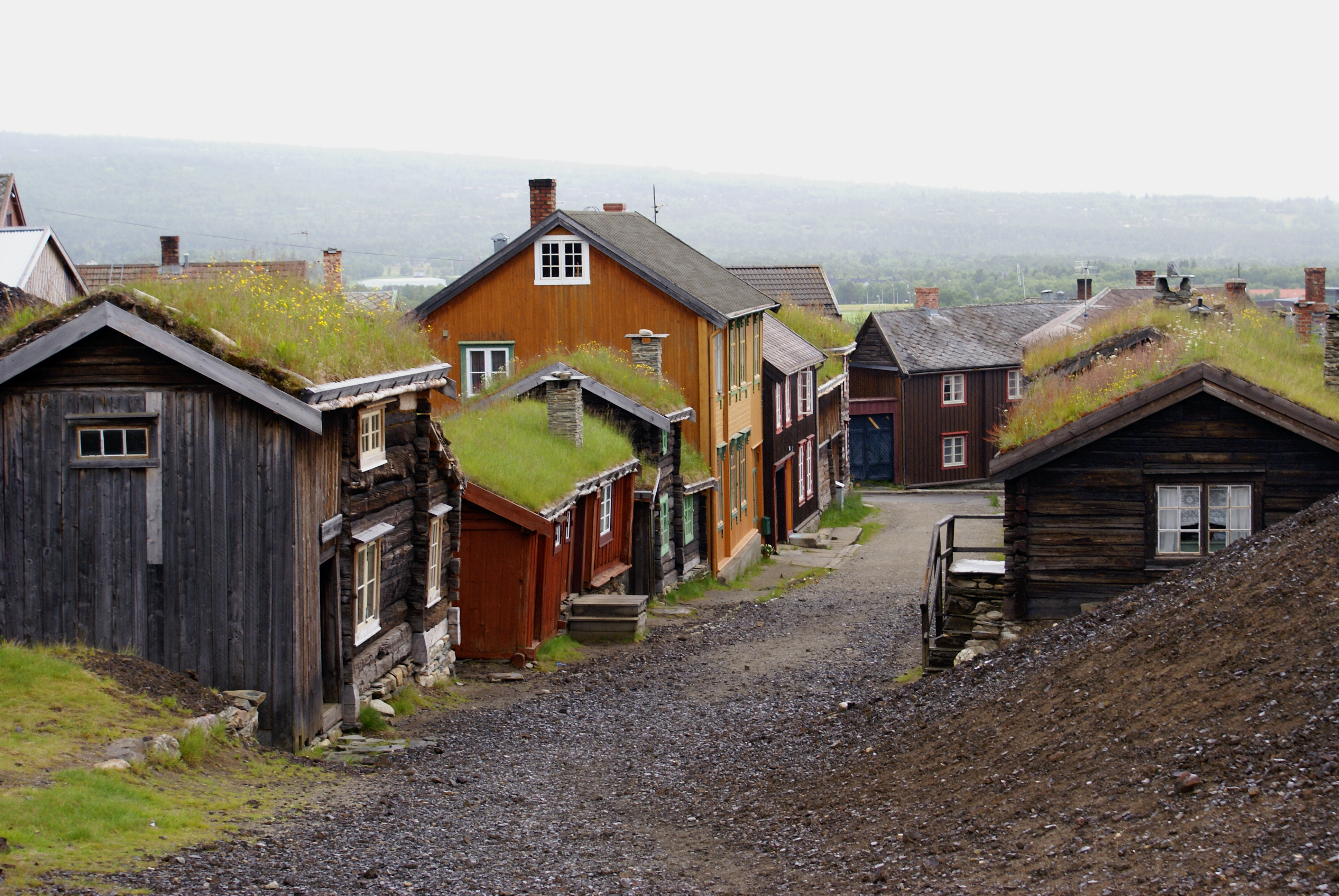 From Røros - Sleggvegen